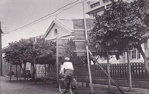 Makou(Makung) in the Japanese Period（日本統治時代の馬公）